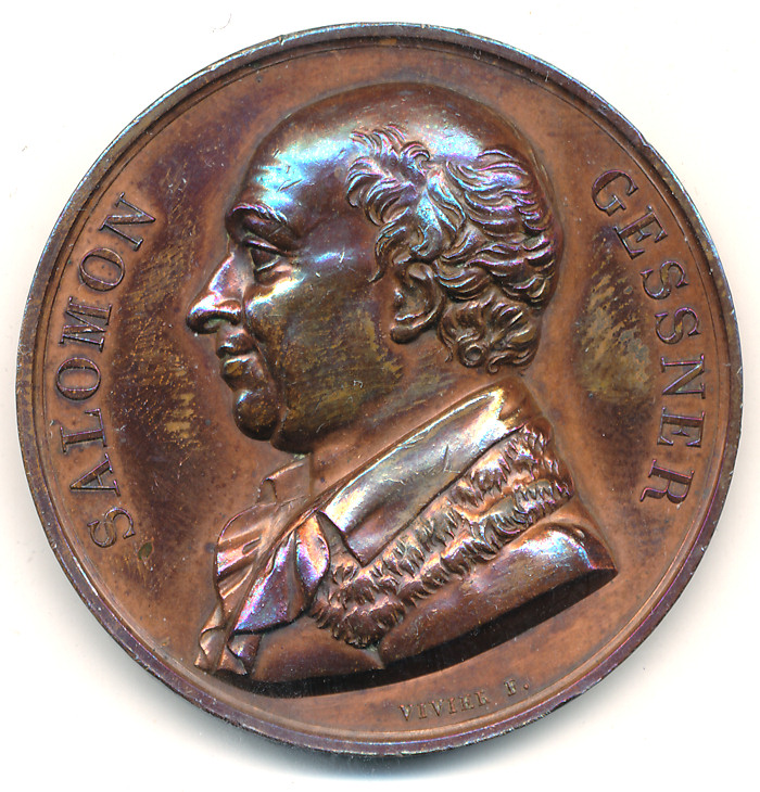 Médaille à l'effigie de Salomon Gessner, 41mm, bronze